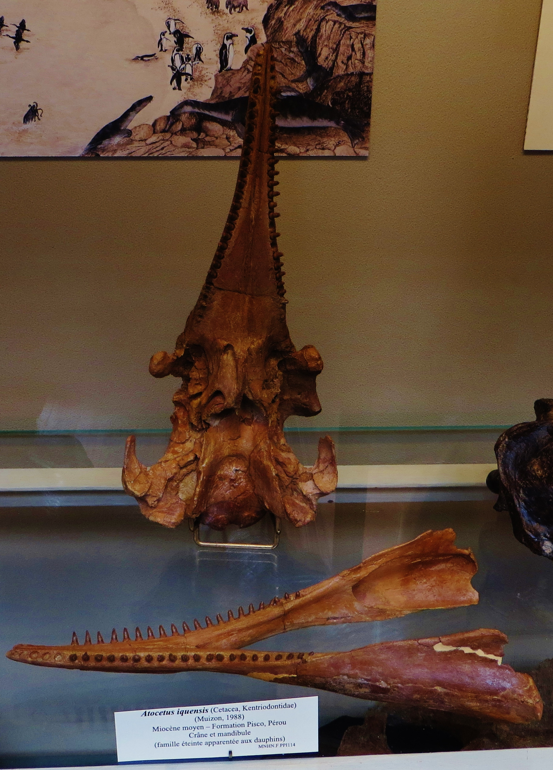 Fossil of Atocetus, an extinct mammal- Took the photo at Museum Histoire Naturelle, Paris